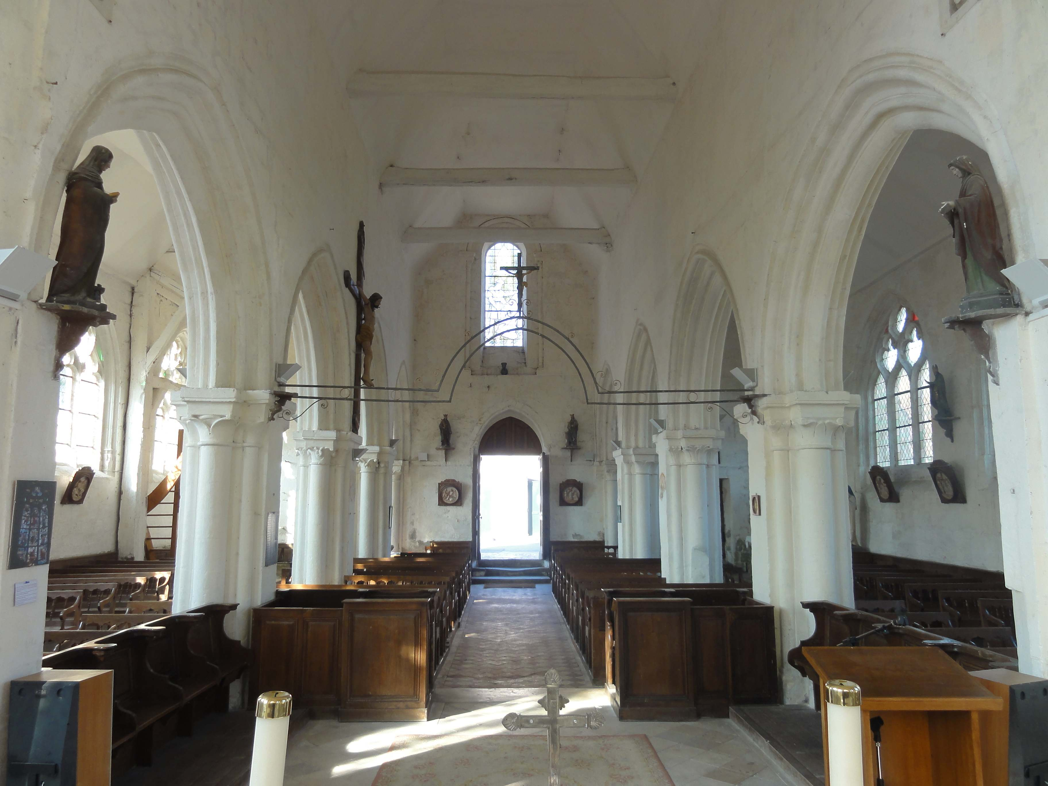 Intérieur de l'église - voir titre.